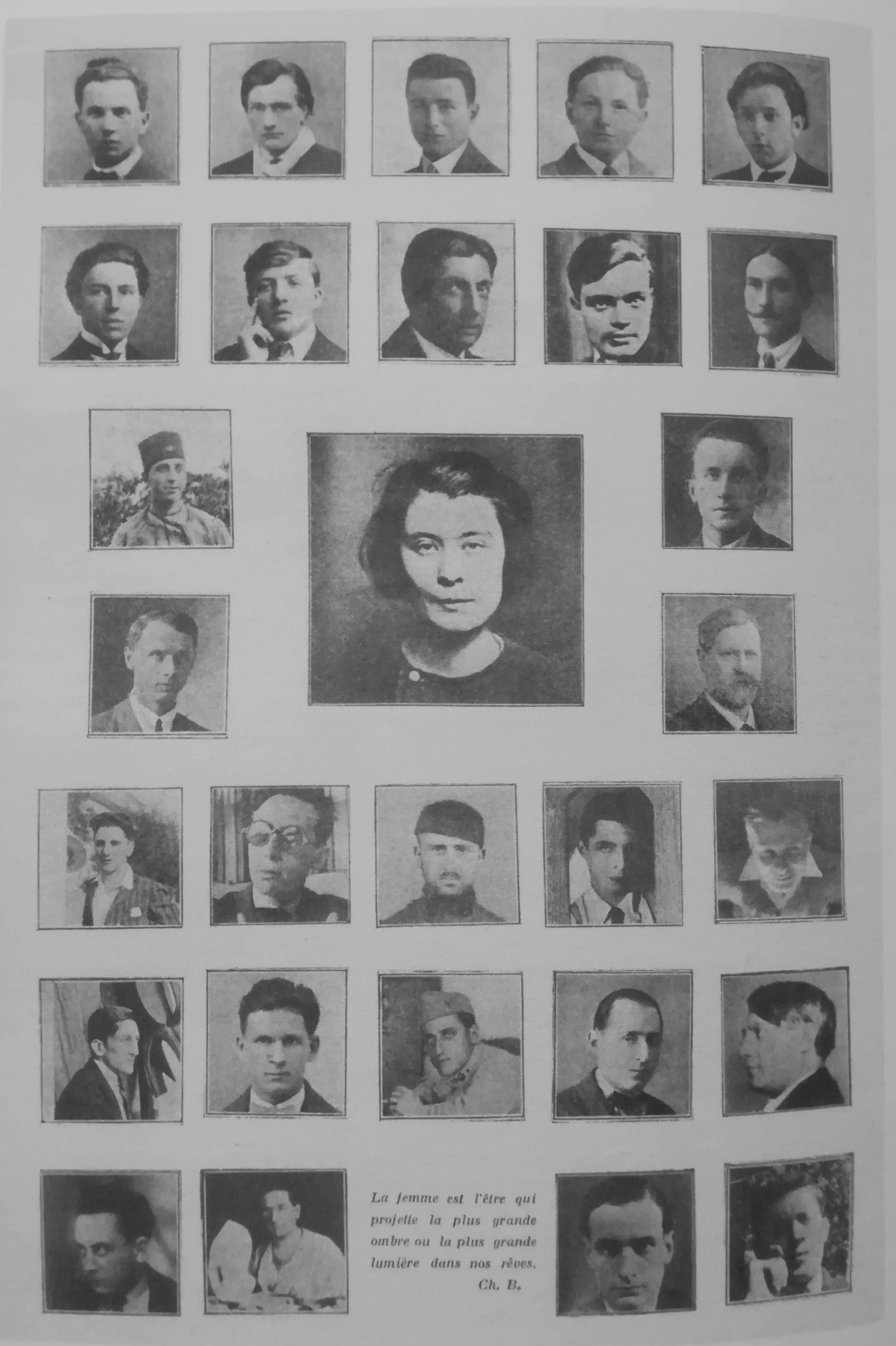 Portrait de Germaine Berton au milieu de surréalistes (dont Louis Aragon, Antonin Artaud, André Breton, Paul Eluard, Sigmund Freud, Pablo Picasso, Man Ray...)